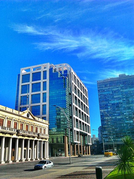 Edificio Presidencial Uruguay - Montevideo